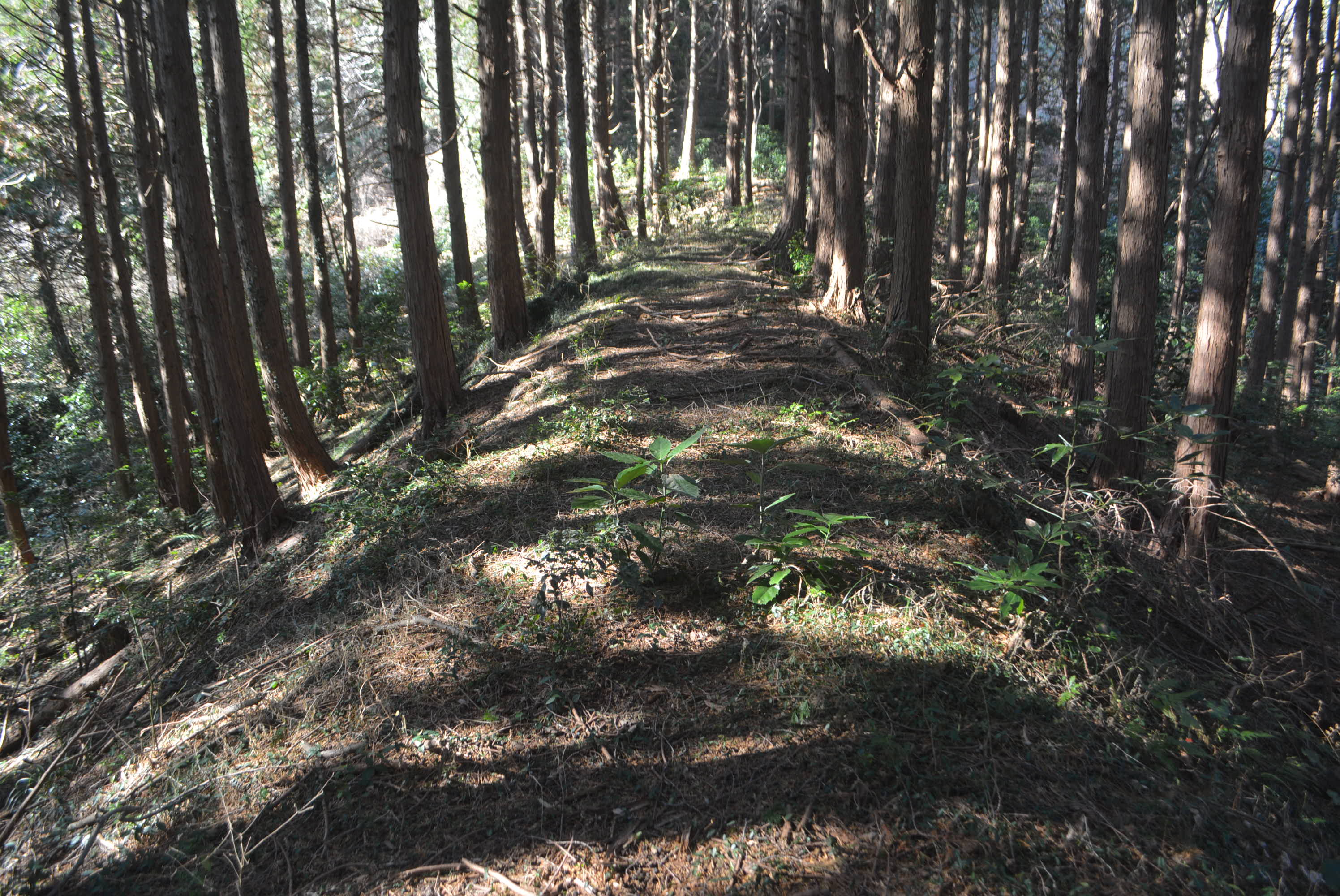 明治時代までの不動峠道跡。盛土の痕跡が残る。石岡市。